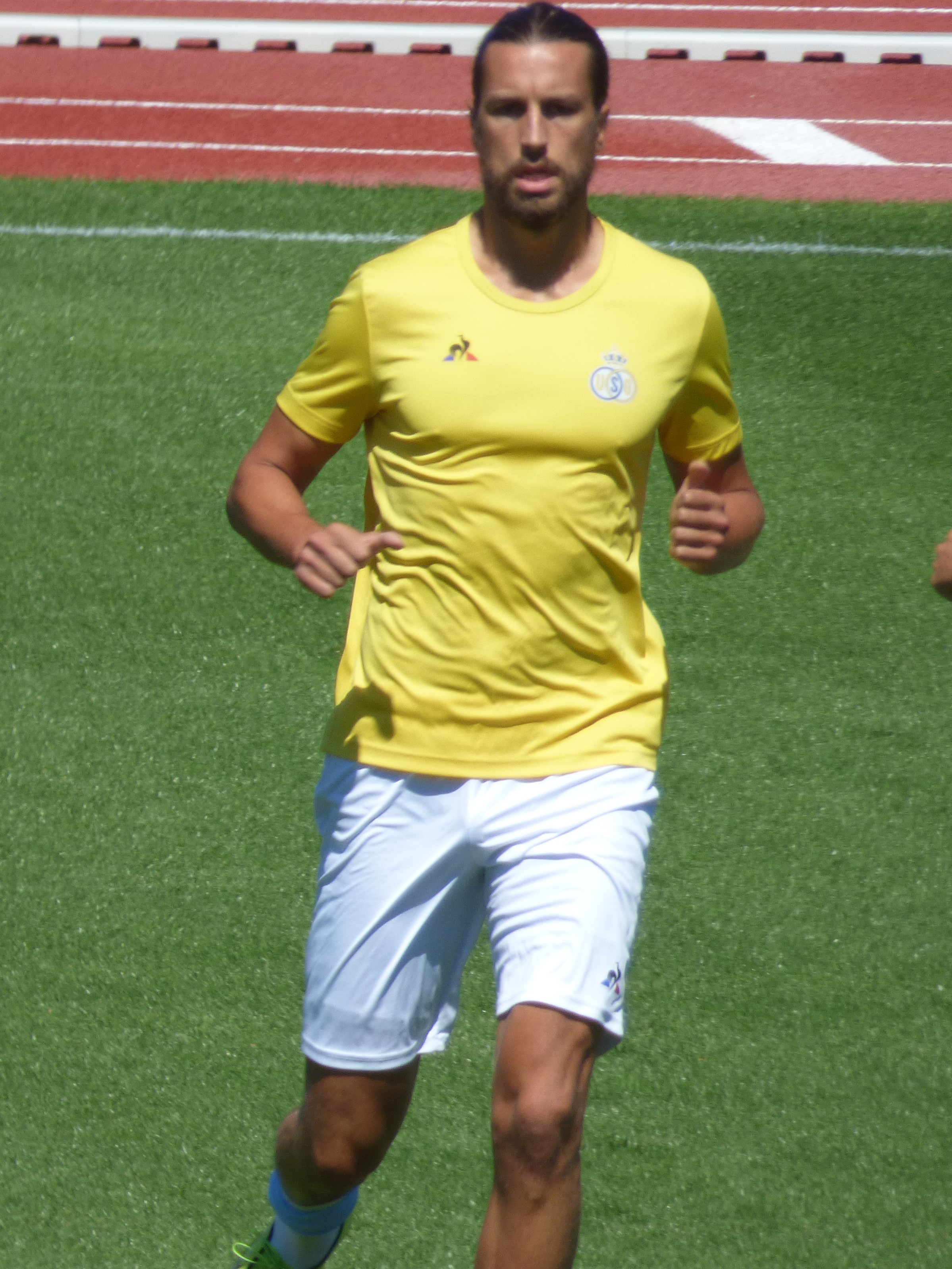 Christian Burgess lors du match amical RC Lens / Union Saint-Gilloise, le 5 août 2020, au Stade Paul-Guerre de Billy-Montigny.